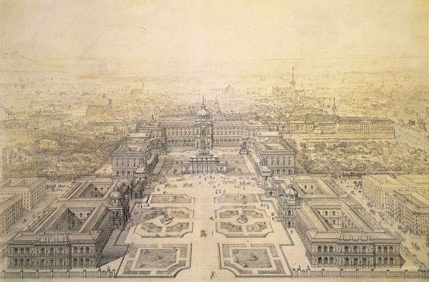 Gottfried Semper, Carl Hasenauer, Kaiserforum, 1869 (Wien, HHStA)